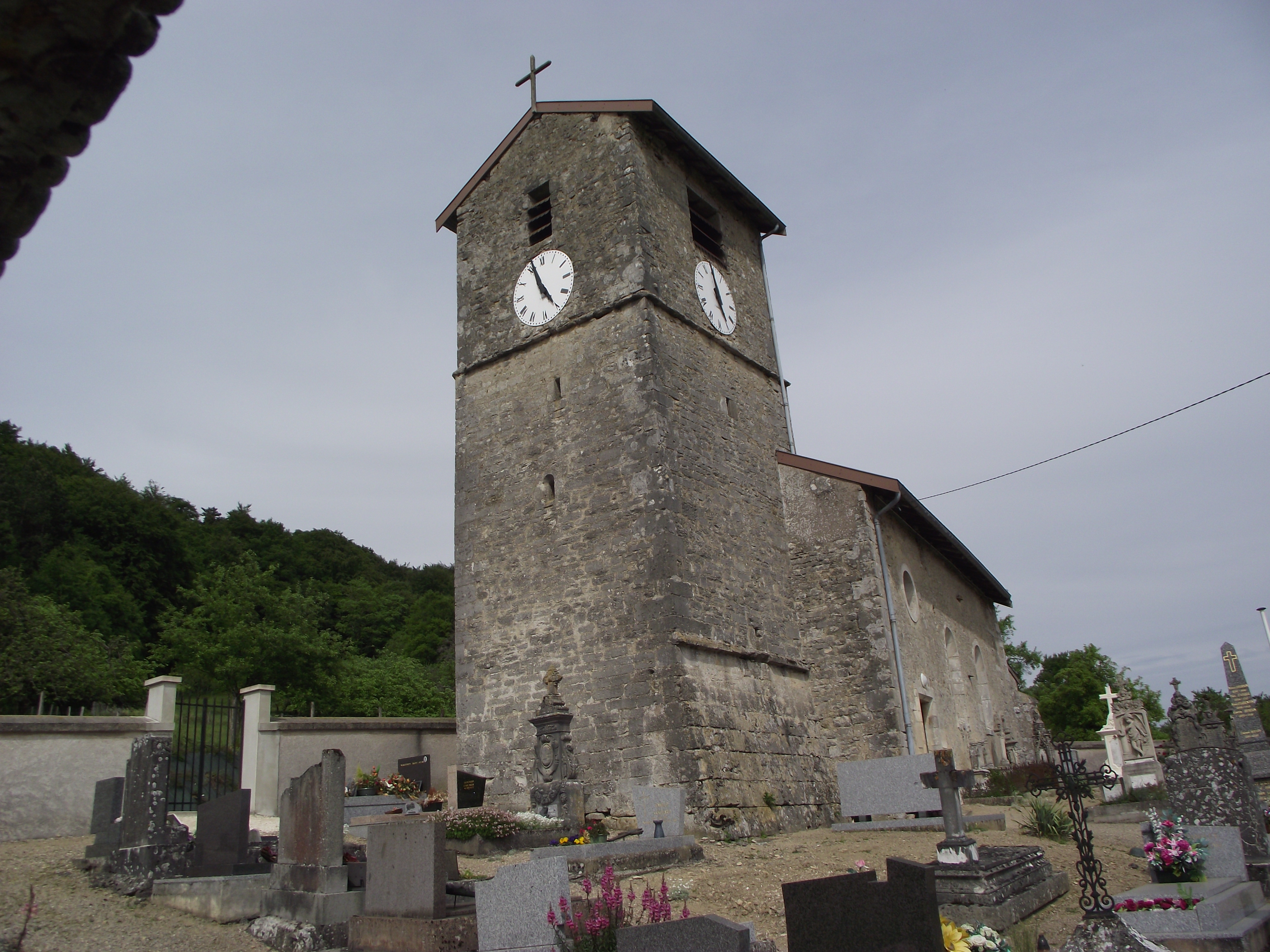 Église Saint Rémy de Mont-L-Étroit